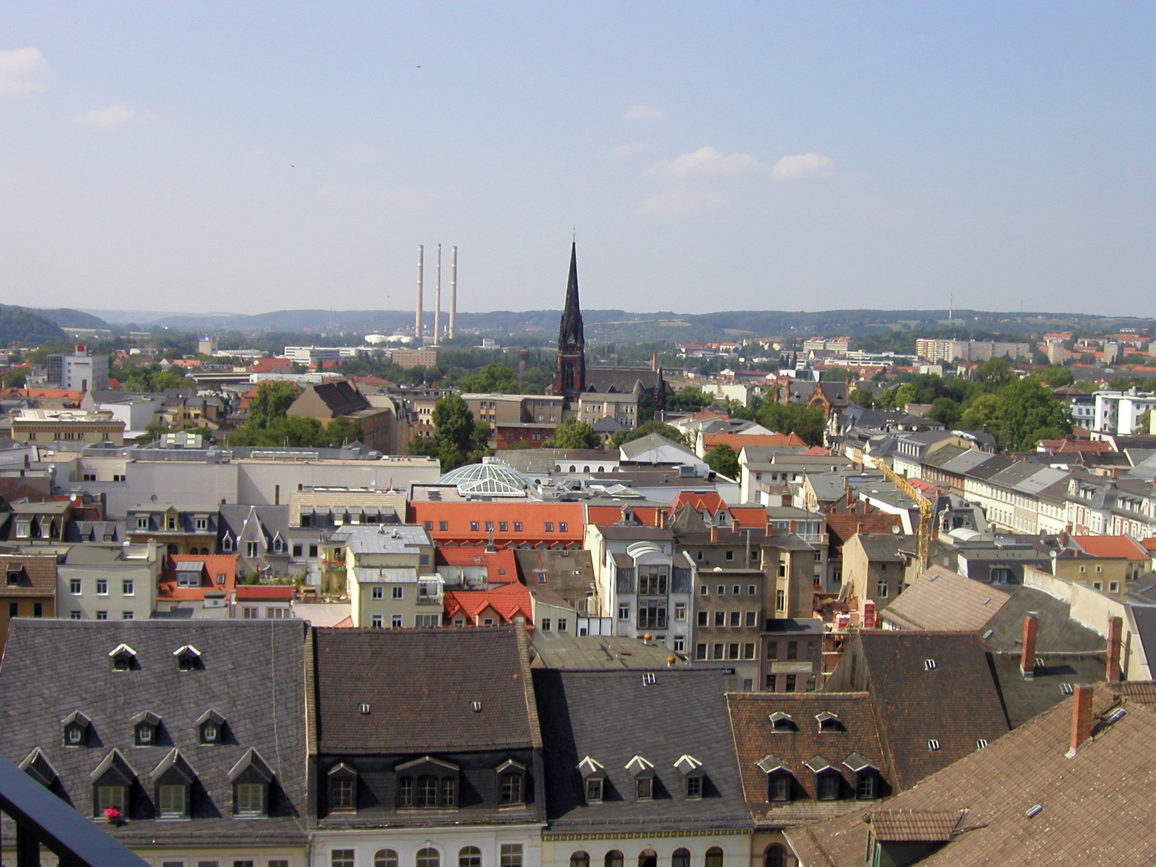 Bildbeschreibung: Blick vom Rathausturm über Gera Fotograf/Zeichner: Schorle Datum: 24.6.2006 Sonstiges: ...